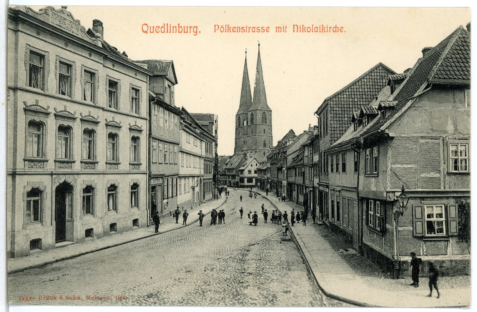 Quedlinburg; Pölkenstraße mit Nikolaikirche This postcard is from publisher Brück & Sohn in Meißen ( This postcard has a unique number 06608 and is available in a higher resolution at the publisher. This images was uploaded in a cooperation project between Wikipedians and the publisher.